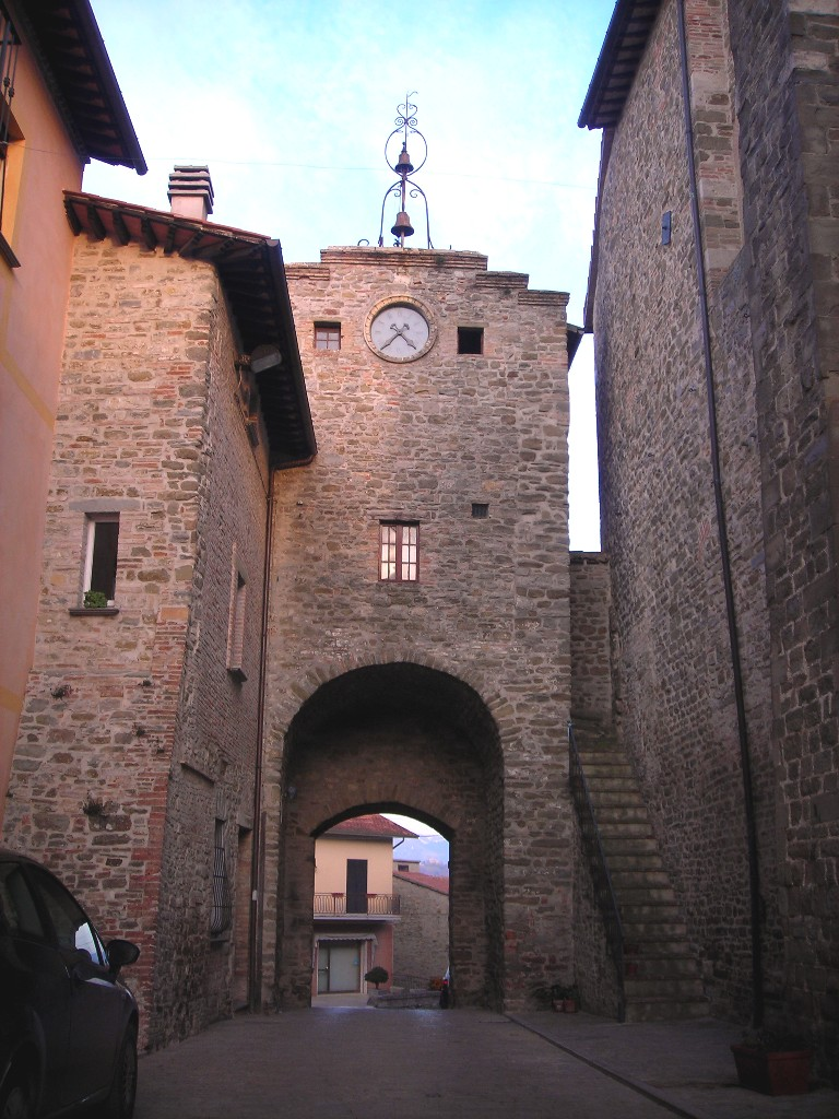 Porta Gualdese, Casacastalda, Valfabbrica, Perugia, Umbria, Italy